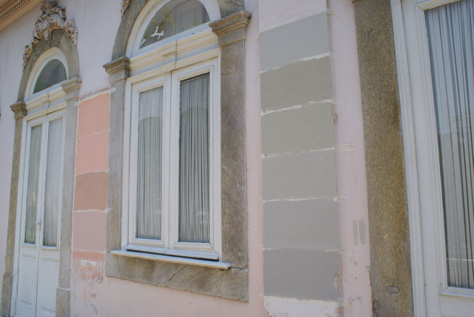 Testes realizados à época da restauração das superfícies externas do Museu Casa de Rui Barbosa, buscando escolher as cores para nova pintura.